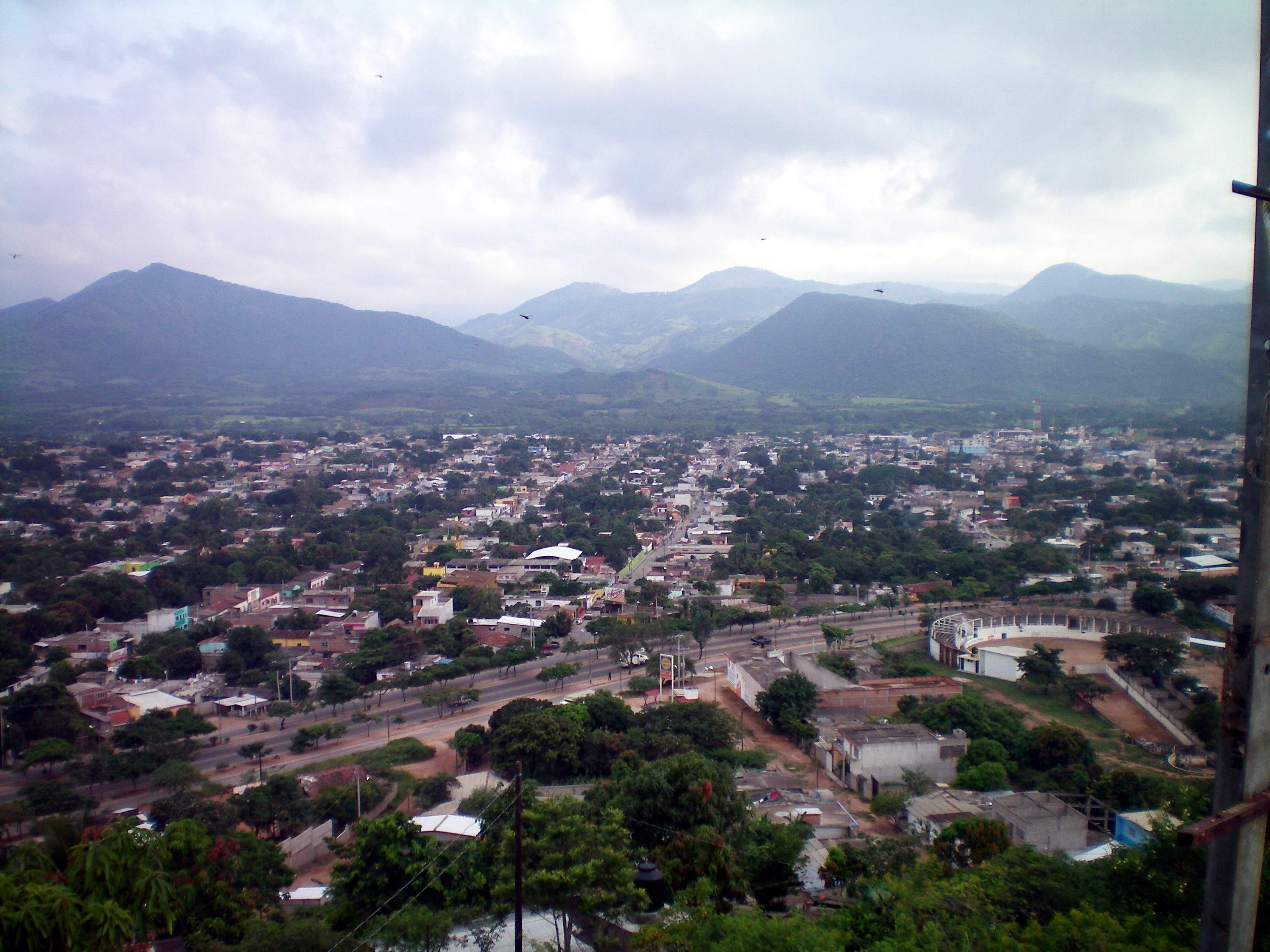 FOTO DE LA CIUDAD DE CINTALAPA